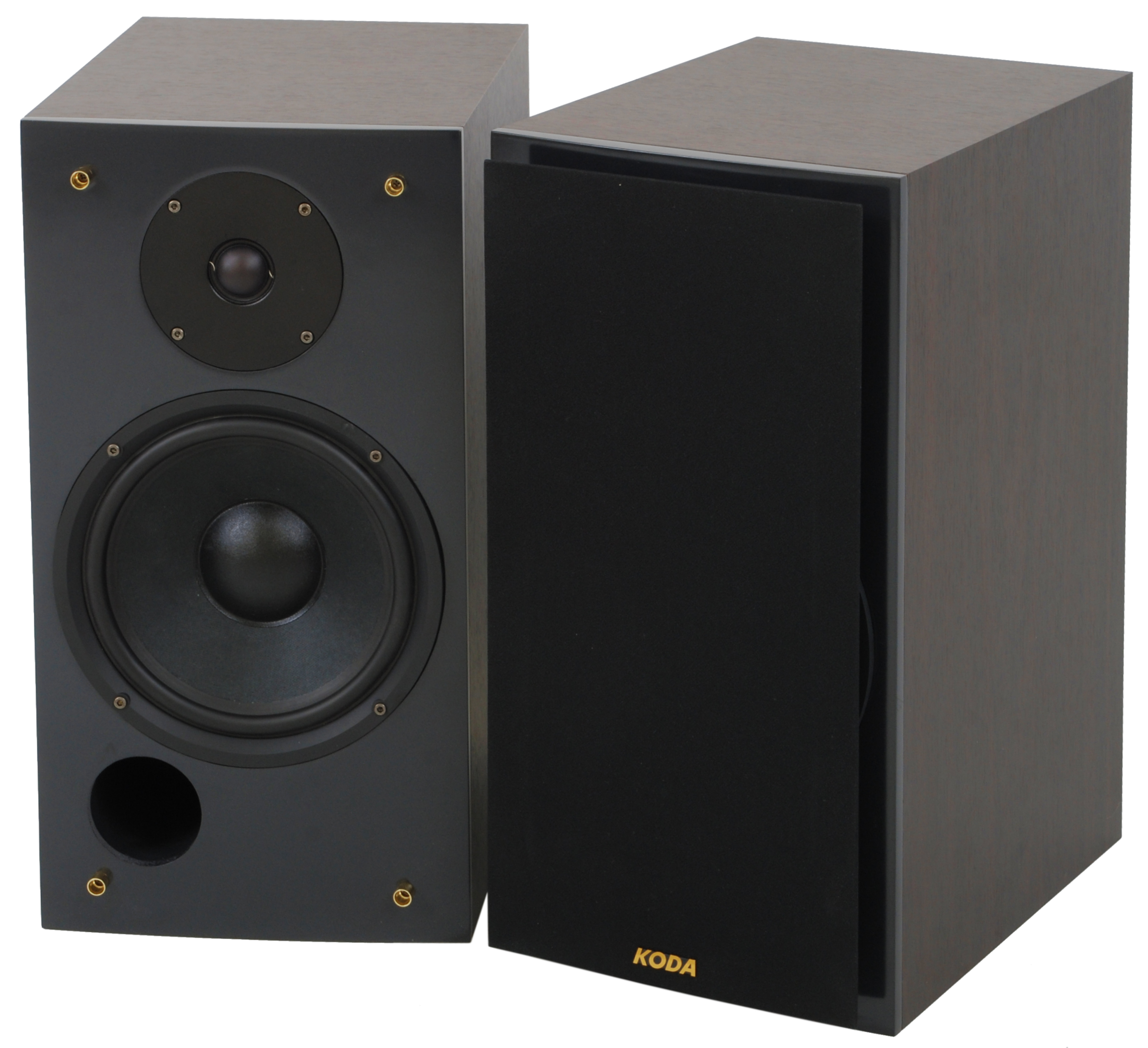 Głośniki podstawkowe K-5500T firmy Koda Koda Harmony K-5500T